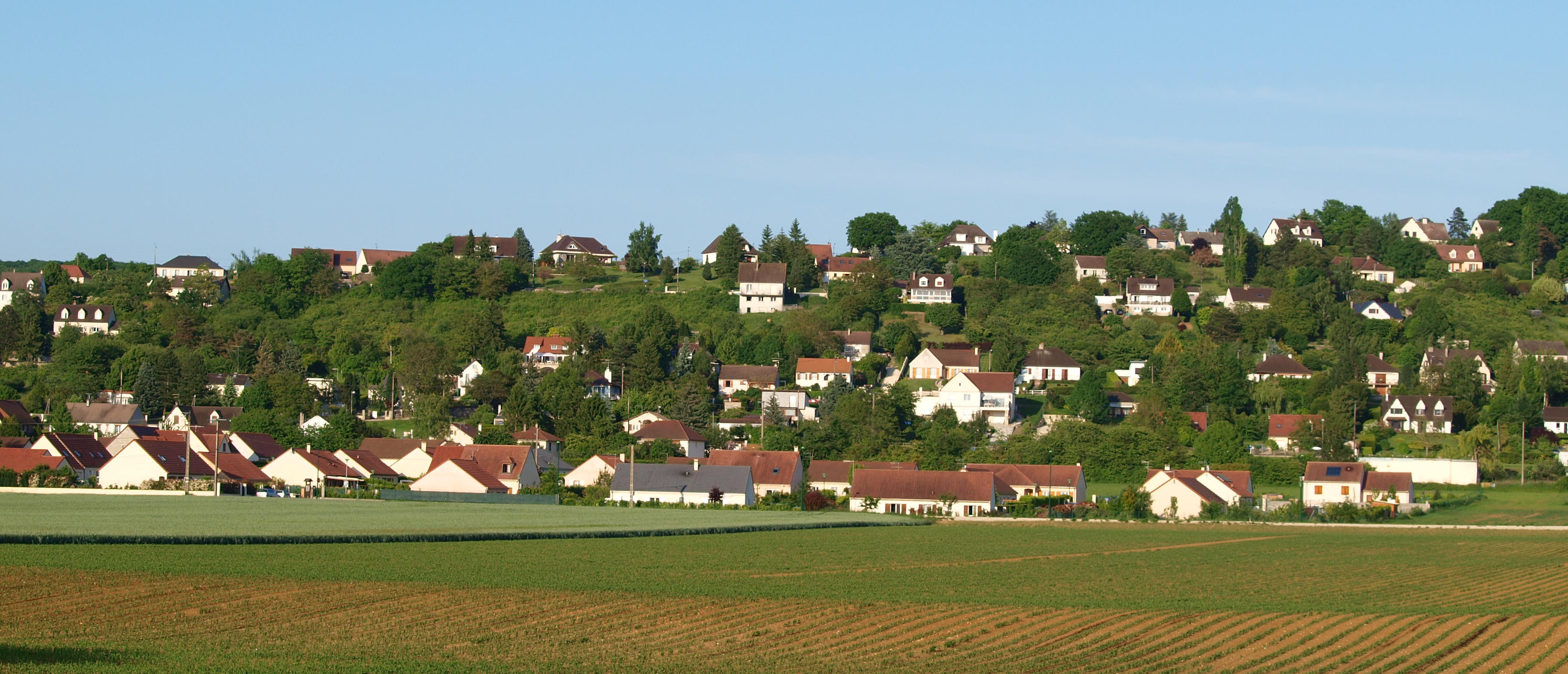 Rosoy (Yonne, France) , vue générale depuis la D606 (ex-RN6)